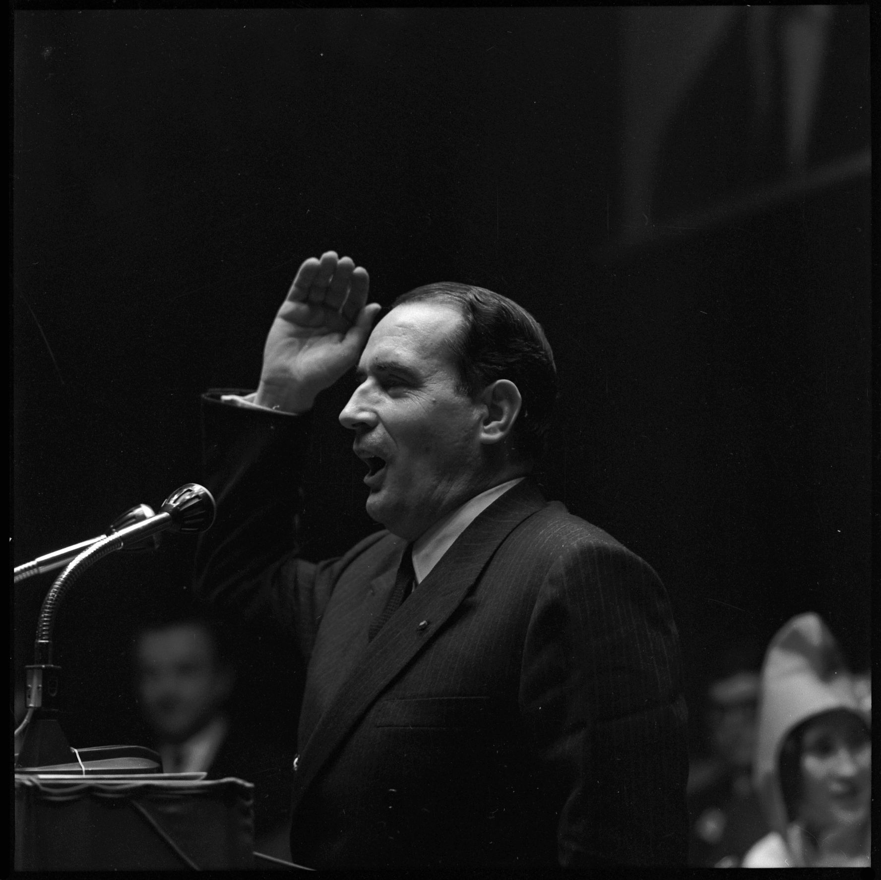 Pas de lieu. 17 Décembre 1965. Vue de François Mitterand lors d'un discours à Toulouse.